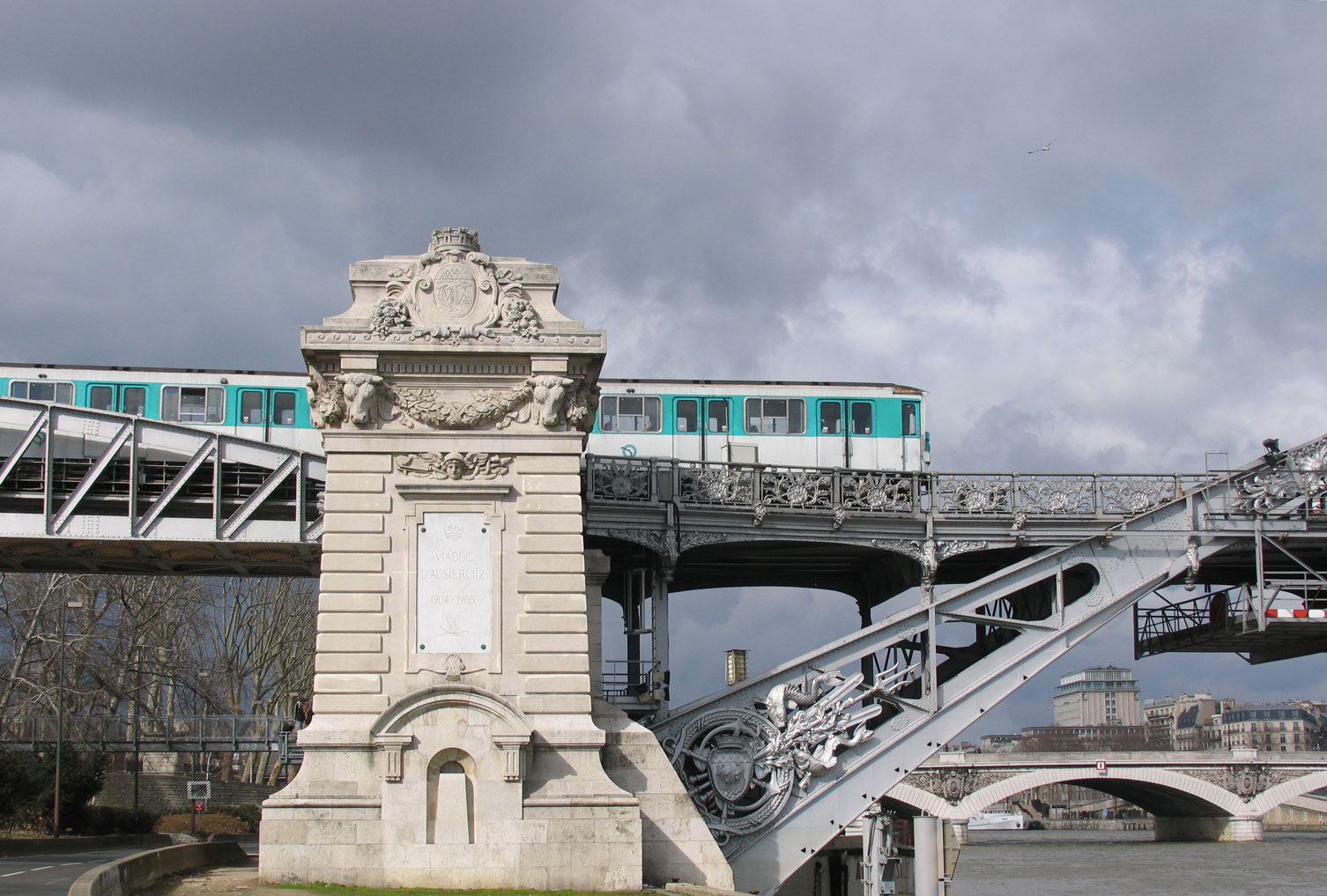 Viaduc d'Austerlitz à Paris Lieu : Paris, France Date : 2006 Author : Pline photo personnelle